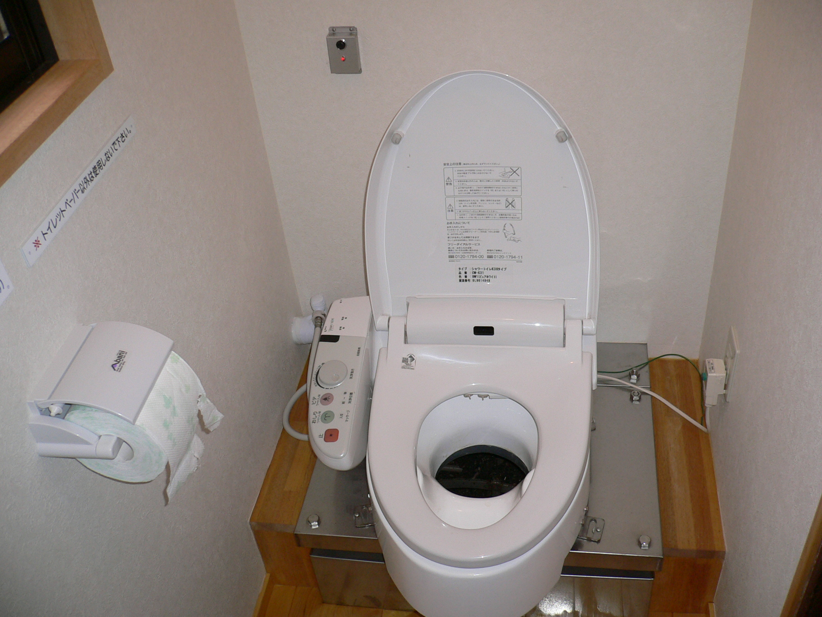 バイオトイレでのウォシュレット使用例